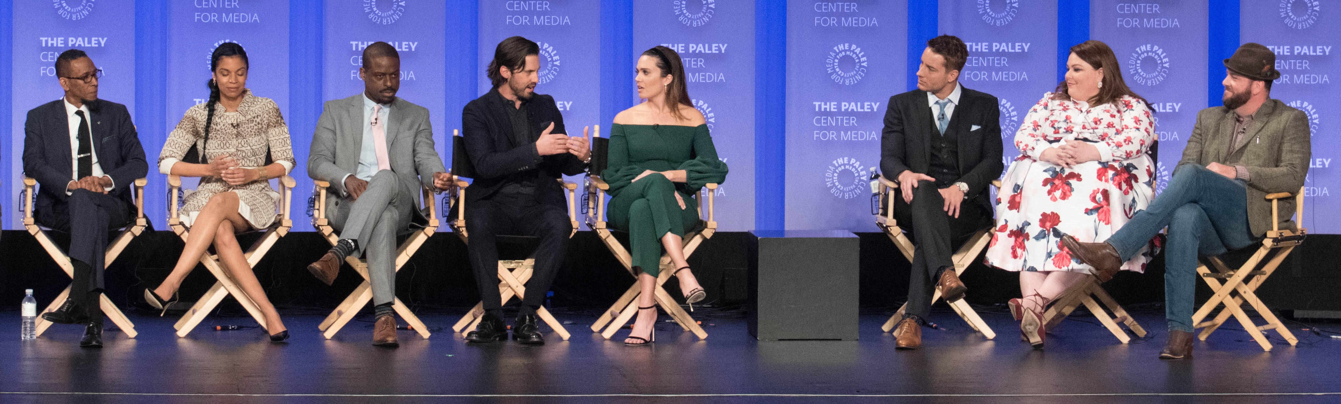 The THIS IS US cast at the 2017 paleyfest